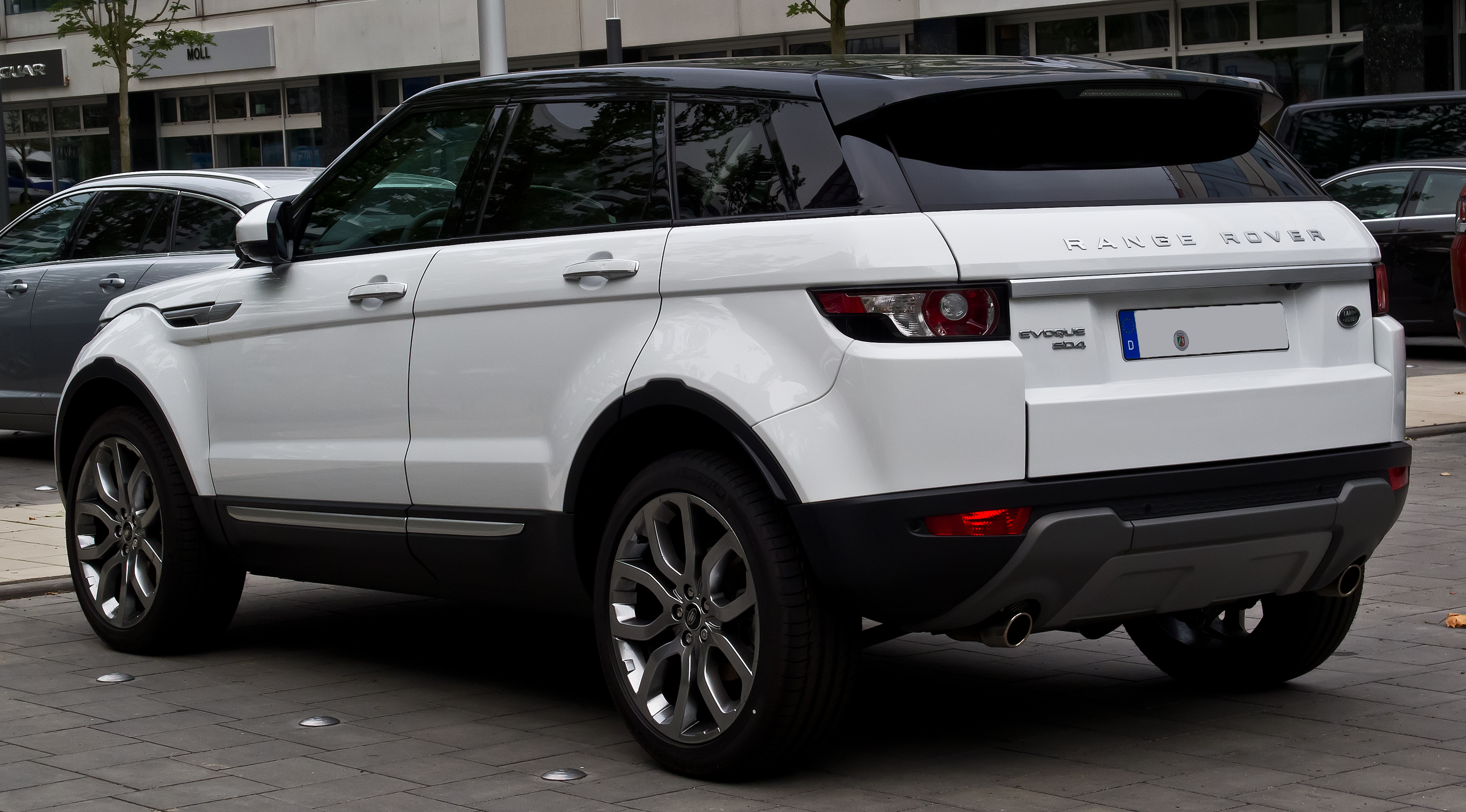 Range Rover Evoque SD4 4WD Prestige